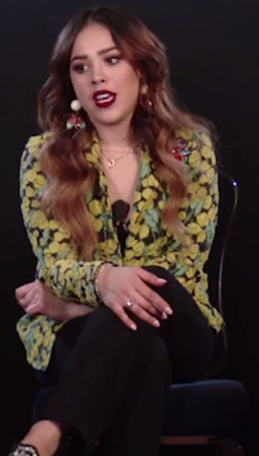 Con el debut cinematográfico de Danna Paola "Lo más sencillo es complicarlo todo", se estrena el 26 de enero en salas mexicanas